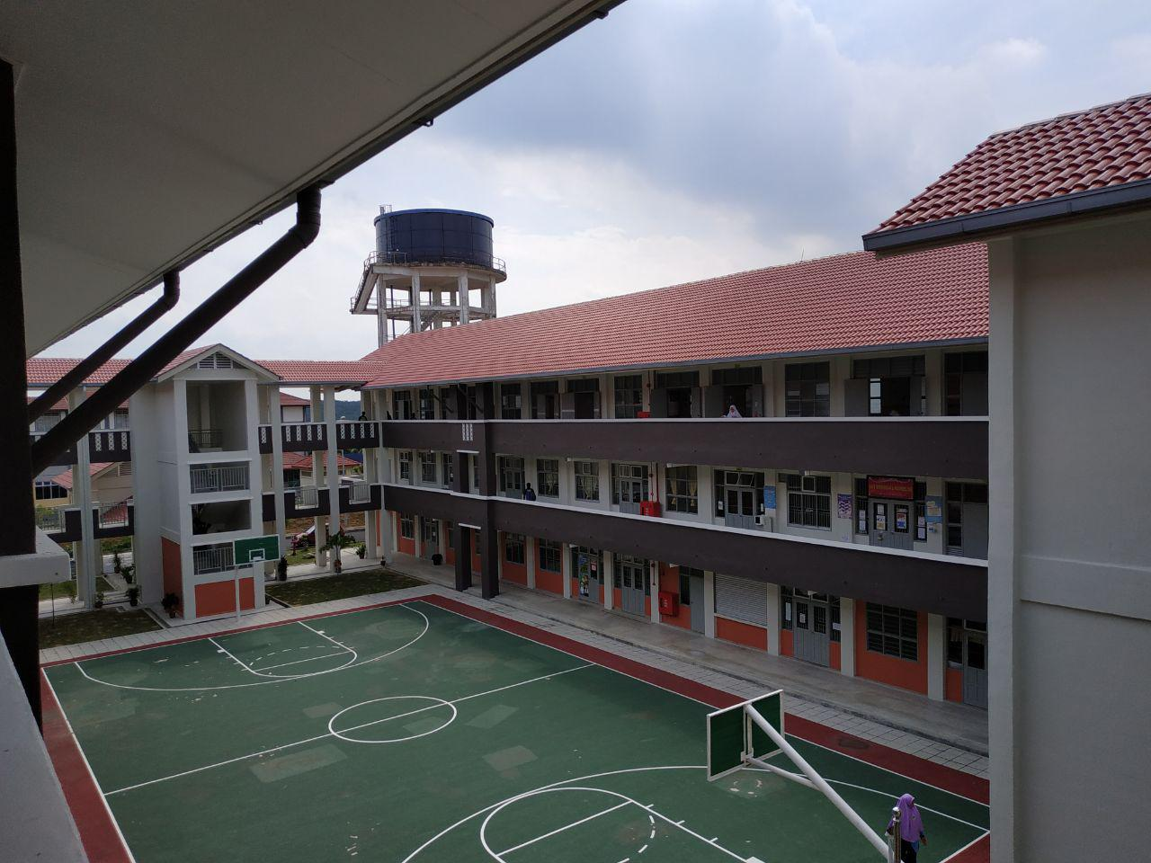 SMA JAIM ASSYAKIRIN